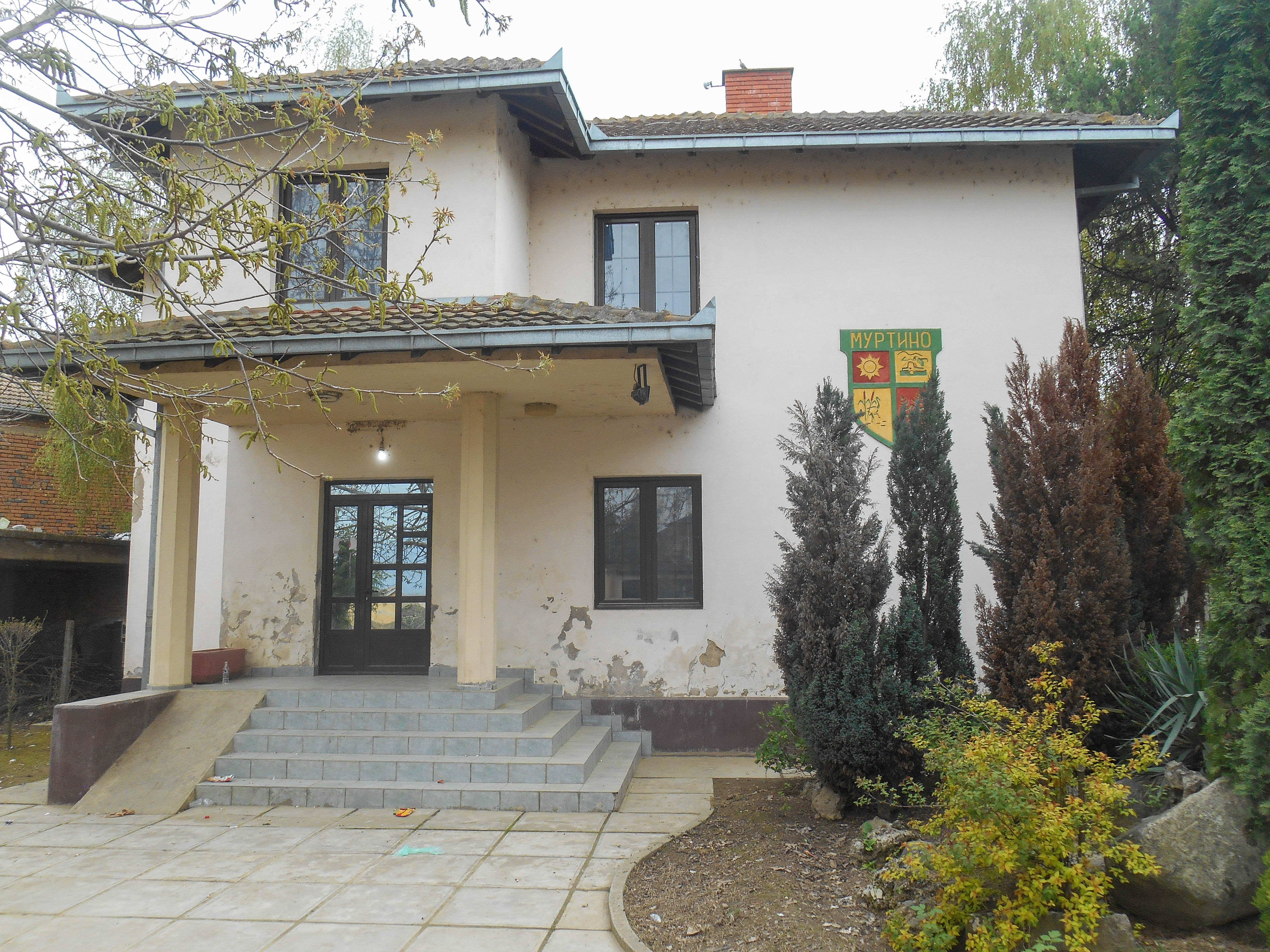 Општинска зграда